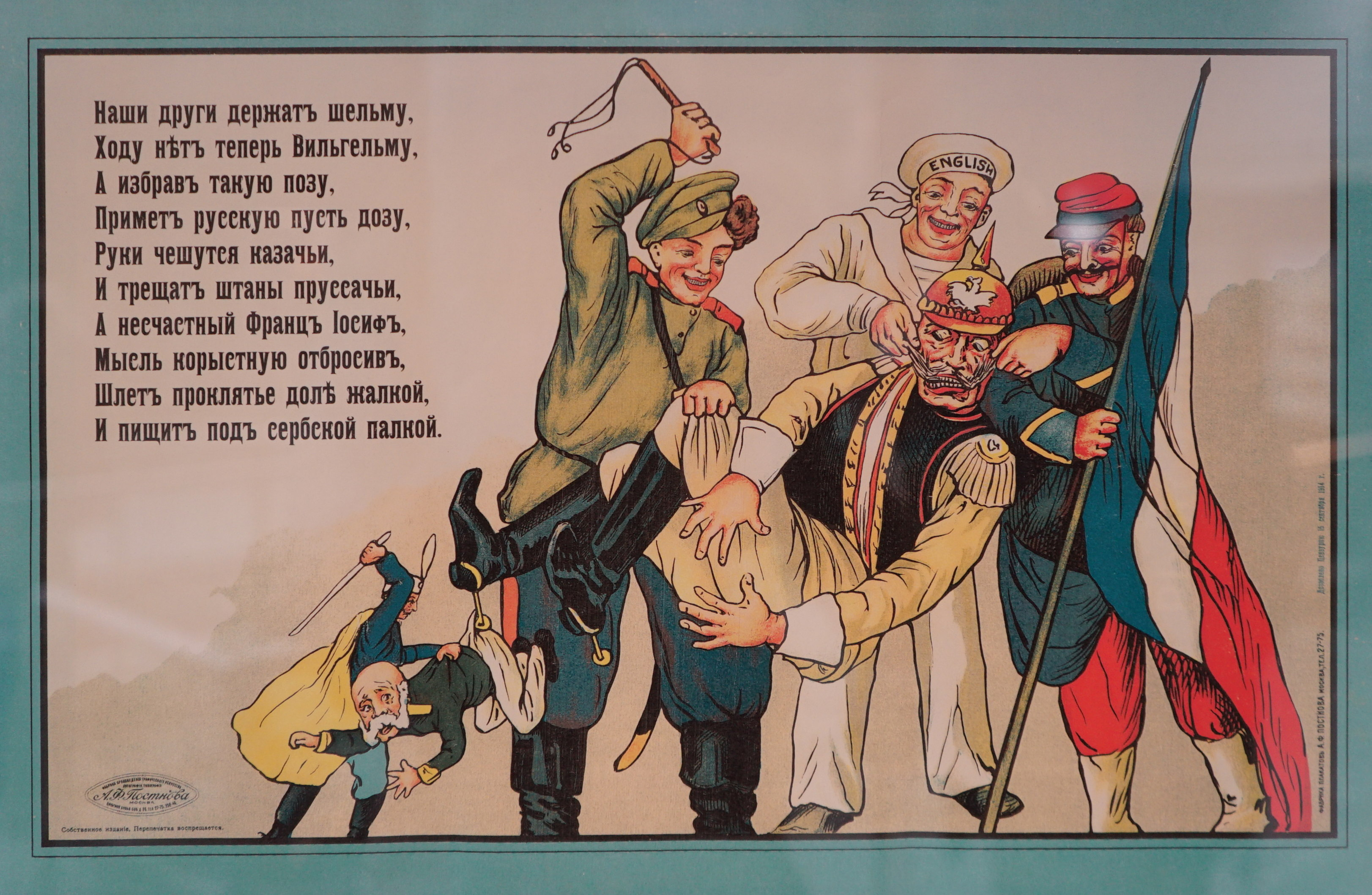 lors d'une exposition temporaire à Courcy.